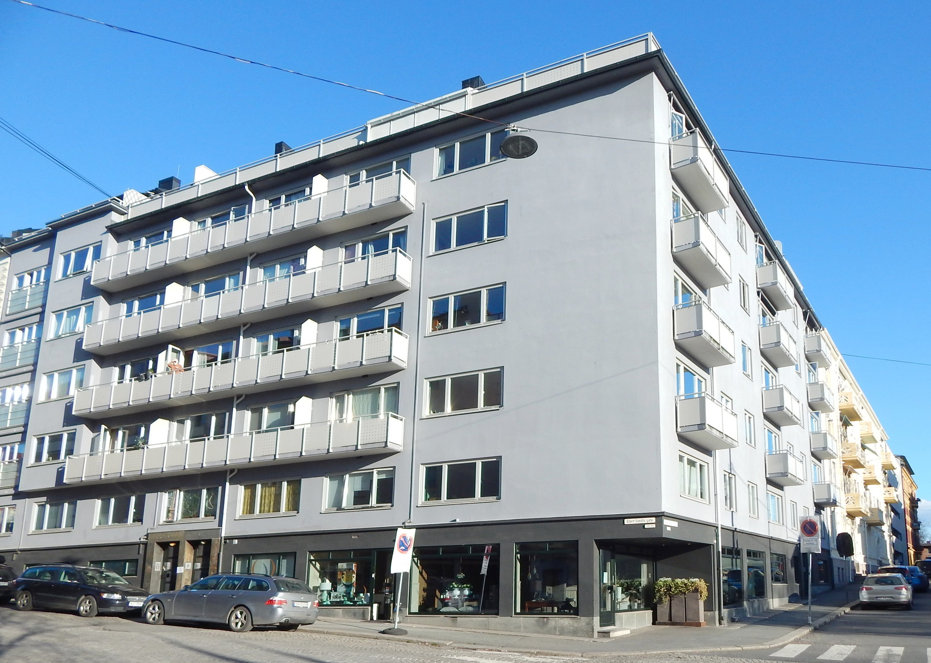 Eilert Sundts gate 11. Arkitekt: Hjalmar S. Bakstad (1935–36).